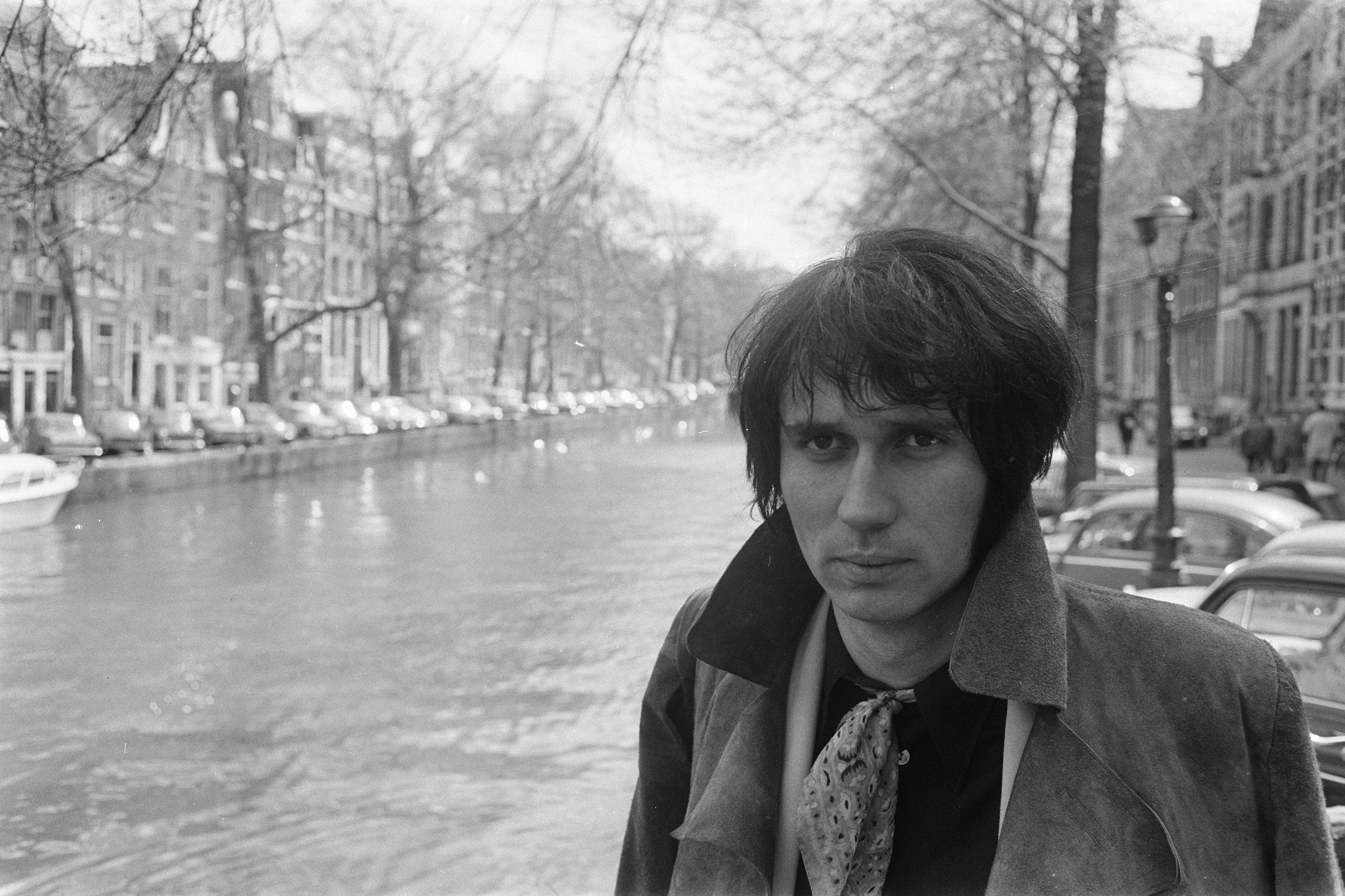 Collectie / Archief : Fotocollectie Anefo Reportage / Serie : Franse zanger Eric Charden in Amsterdam Beschrijving : zangers, Charden, Eric Datum : 28 april 1970 Locatie : Amsterdam, Noord-Holland Trefwoorden : zangers Persoonsnaam : Charden, Eric Fotograaf : Eric Koch / Anefo Auteursrechthebbende : Nationaal Archief Materiaalsoort : Negatief (zwart/wit) Nummer archiefinventaris : bekijk toegang 2.24.01.05 Bestanddeelnummer : 923-4773